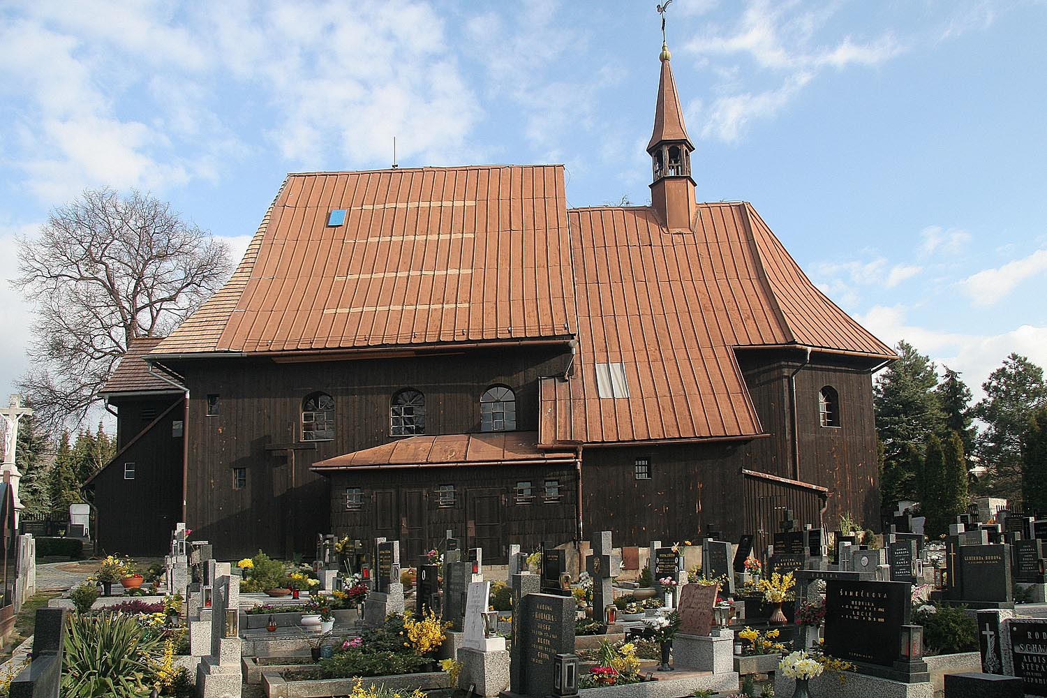 Dřevěný barokní kostel svatého Petra a Pavla ve Hněvošicích, district Opava, Czech Republic